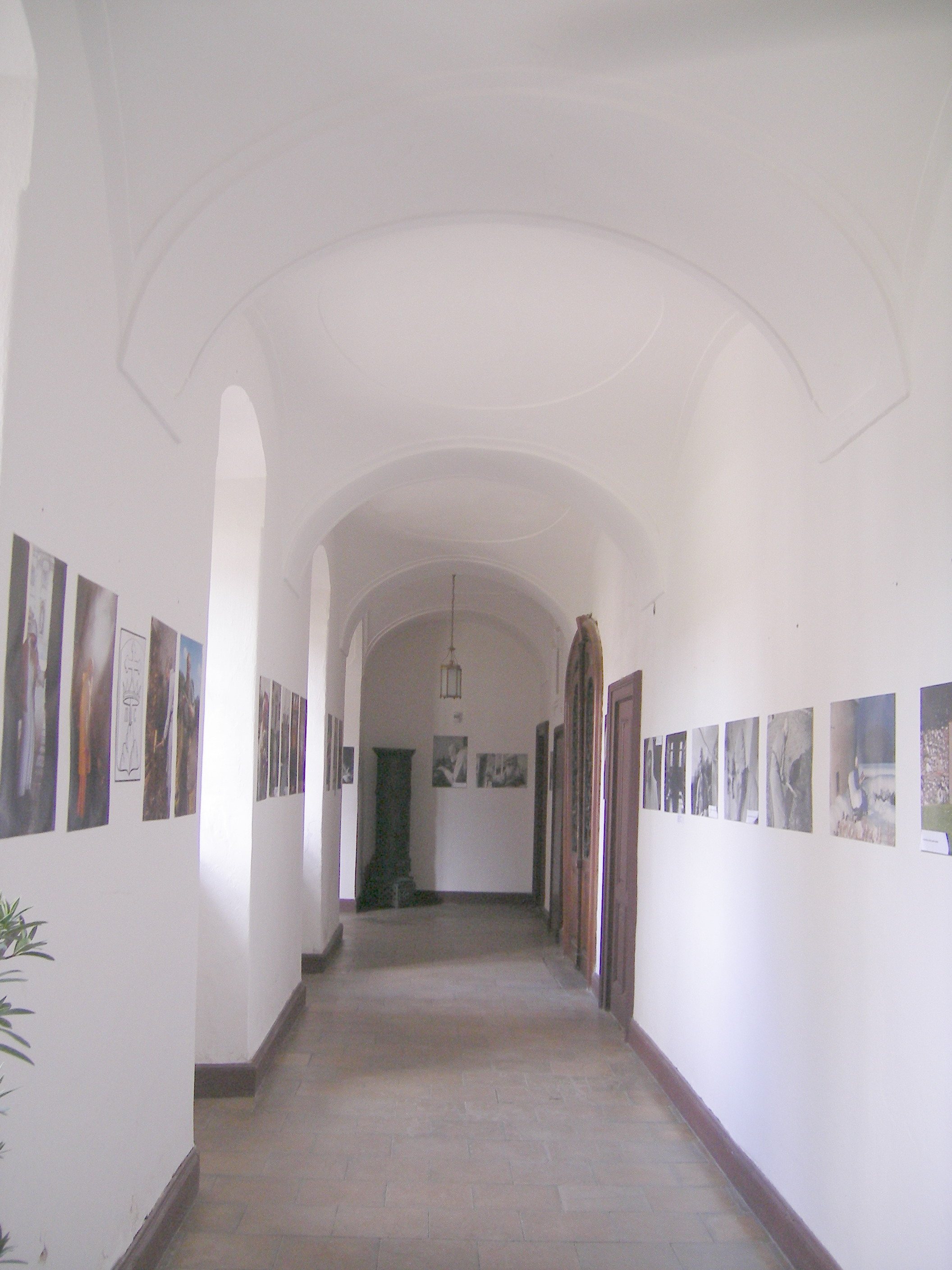 Oroszlány - majkpusztai kamalduli apátság